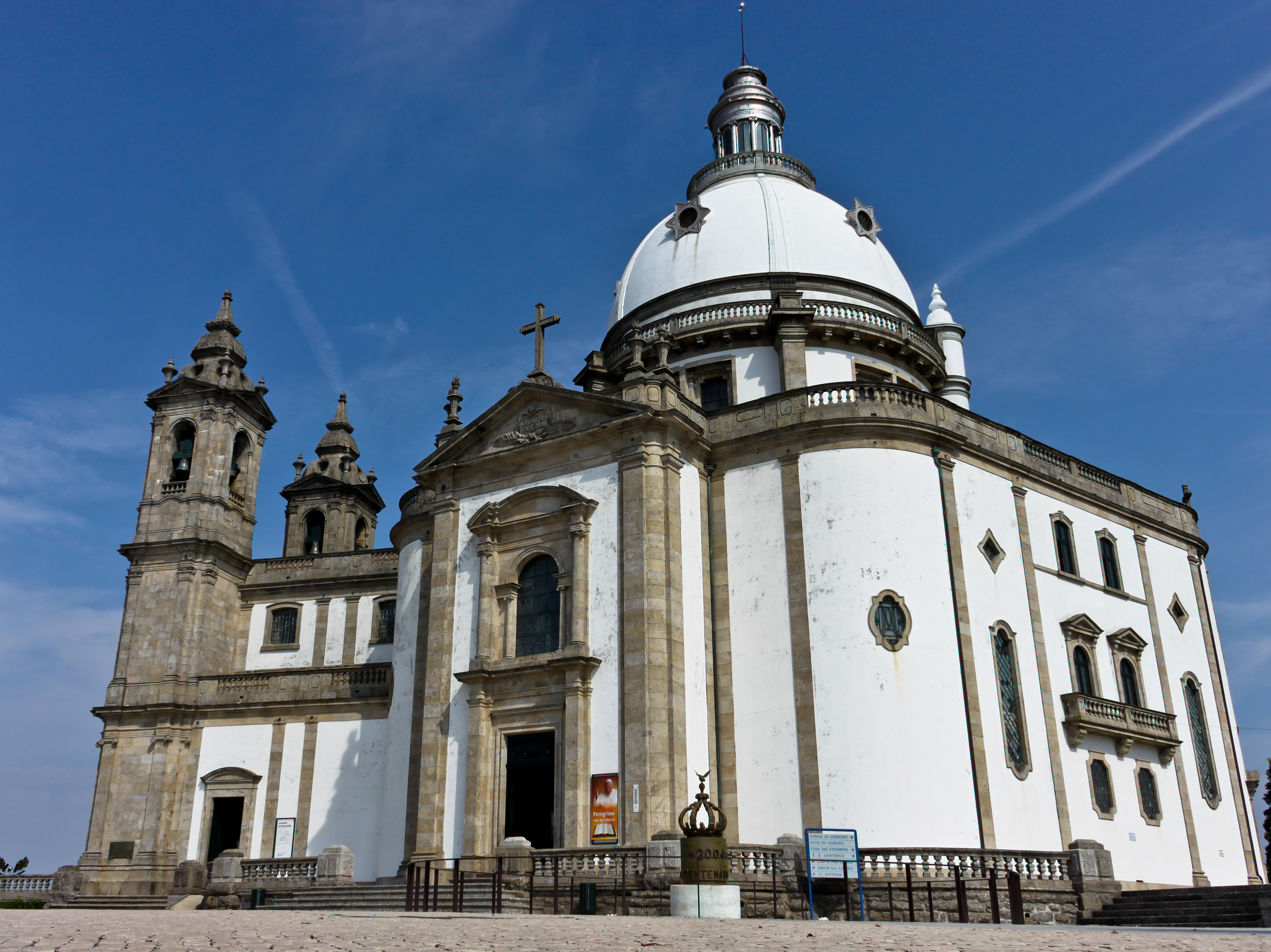 Braga This file was uploaded for Wiki Loves Monuments in Portugal with the unique identifier 97009583.